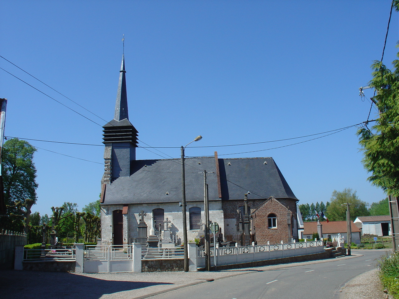 Église de Ternas